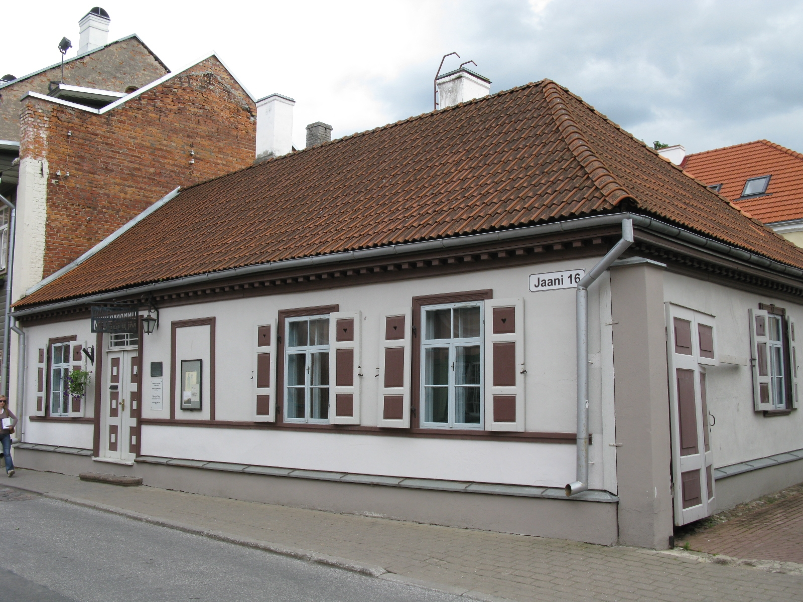 19. sajandi linnakodaniku muuseum Tartus Jaani tänavas, vaade Laia tänava poolsele nurgale